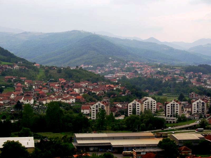 Opstina Brus, autor: Marko Basic , izvor